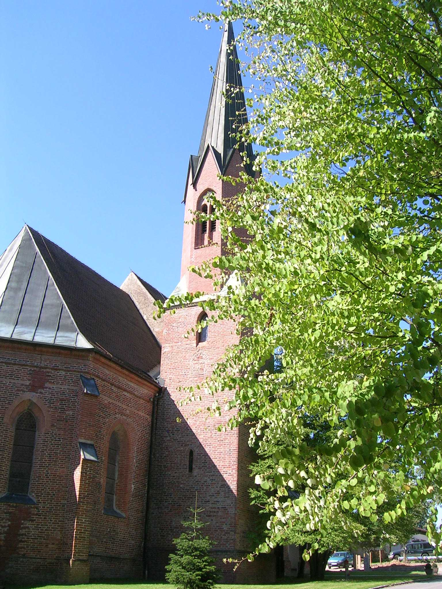 Wallfahrtskirche St. AlbanThis is a photograph of an architectural monument.